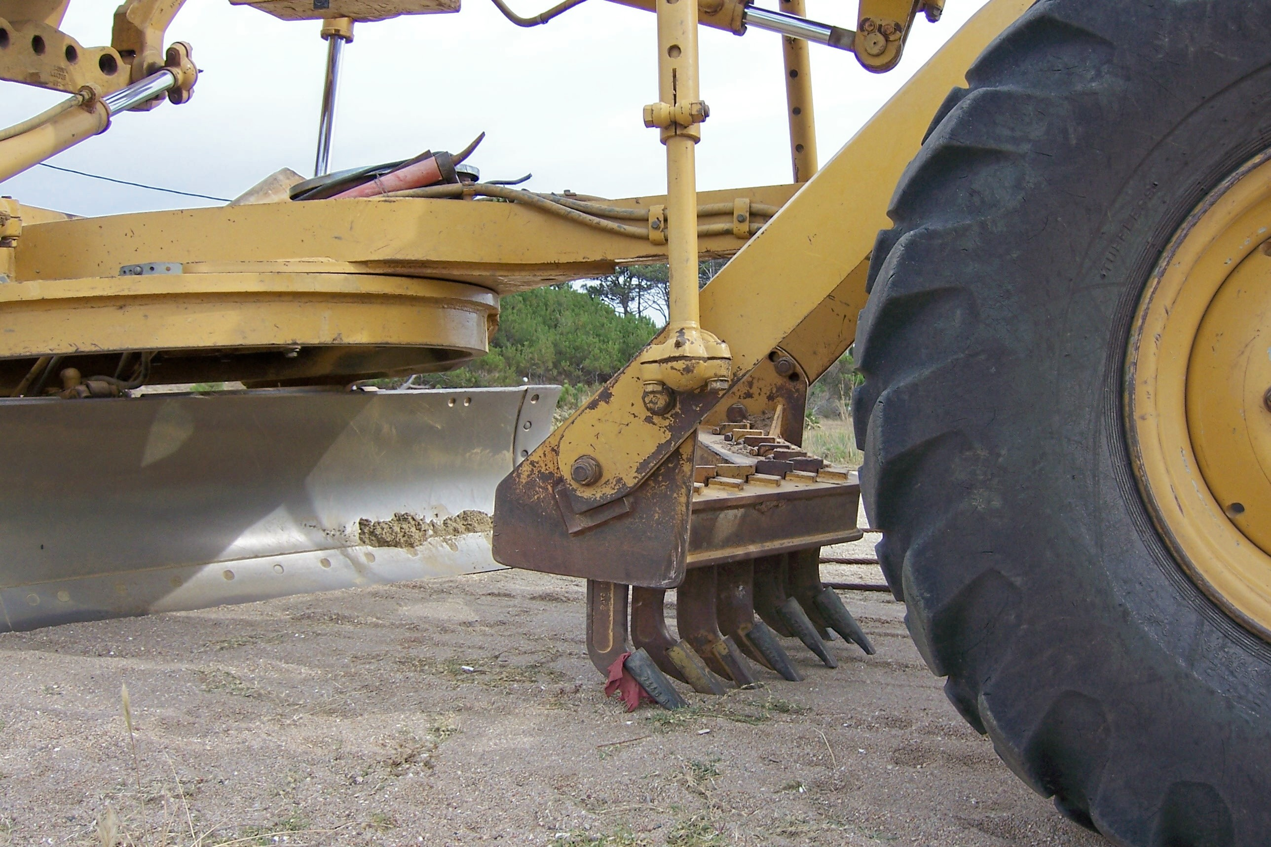 Motoniveladora, vista del escarificador.